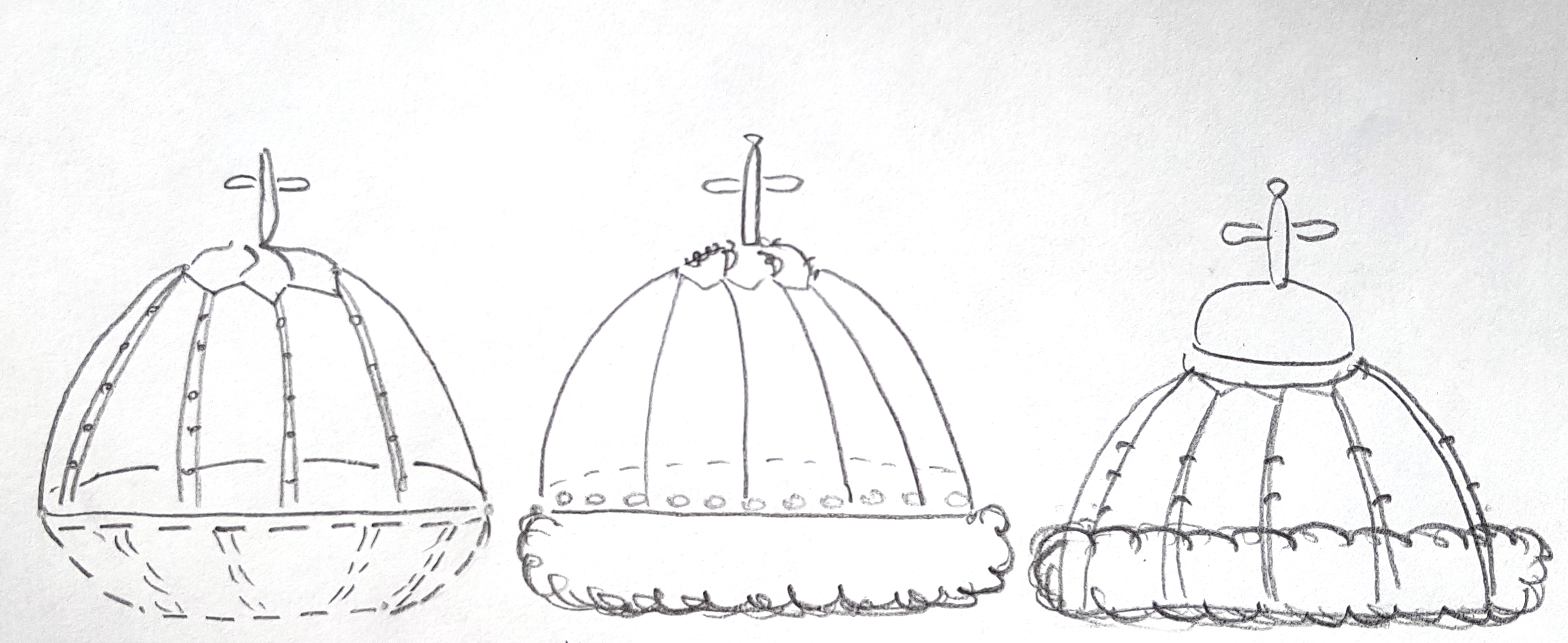 Конструктивные стадии шапки Мономаха по материалам исследования по книге Жилиной Н. В. «Шапка Мономаха: Историко-культурное и технологическое исследование», Институт археологии РАН. — М.: Наука, 2001. — 248 с. — 1 000 экз. — ISBN 5-02-008722-X.